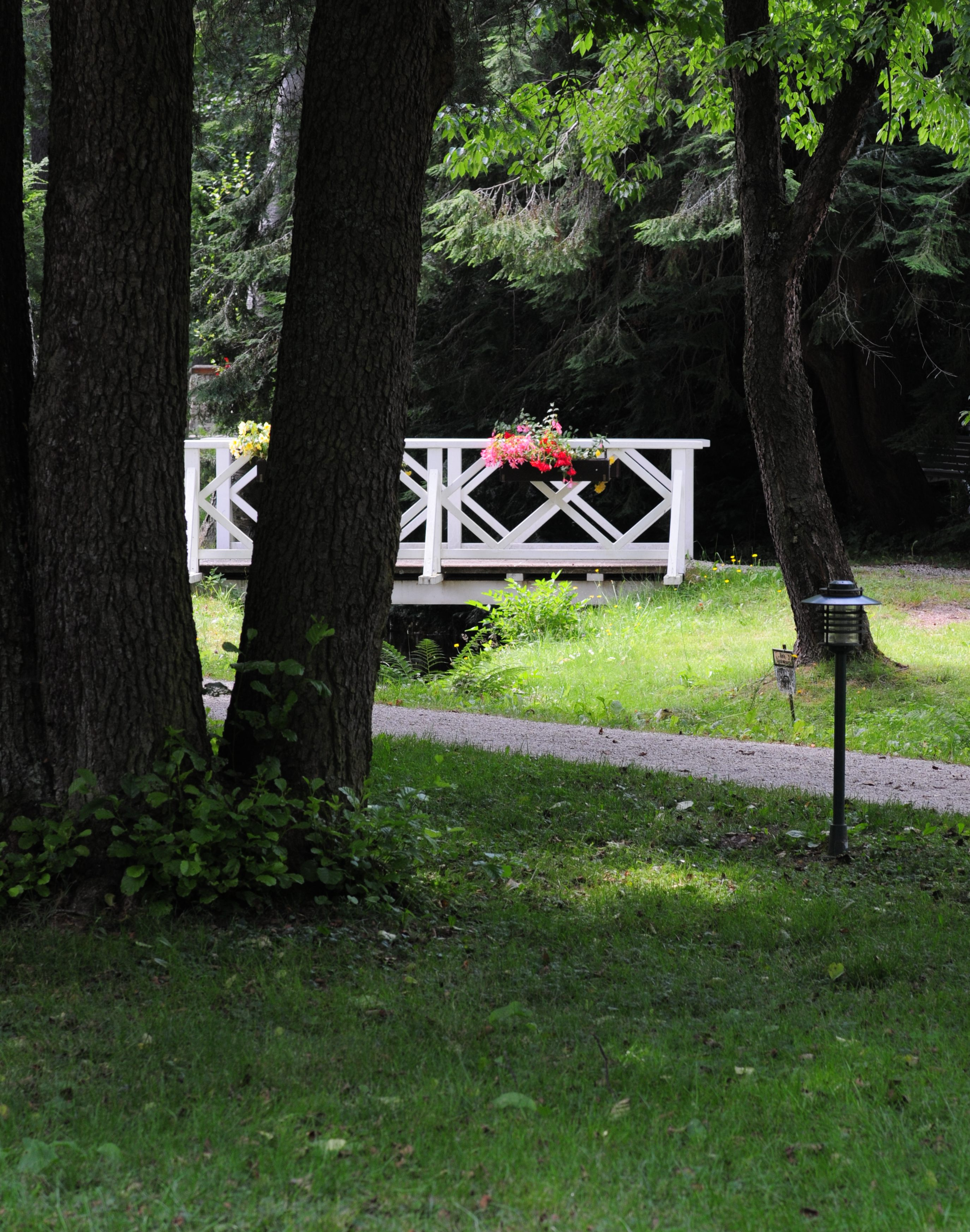 Gemeinde Bad Brambach, Kurpark Bad Brambach, Parkgelände (Vogtlandkreis, Freistaat Sachsen, Deutschland)